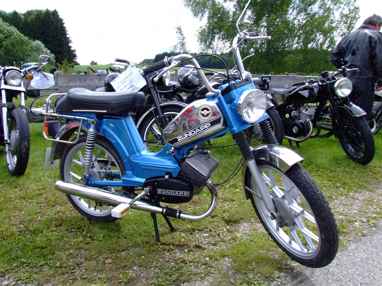 Quelle: selbst fotografiert, 08/2006 Fotograf: Späth Chr.